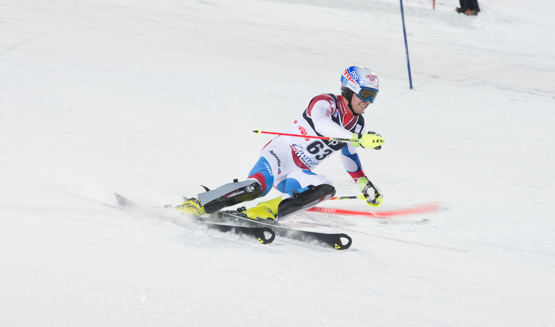 NIEDERBERGER B.